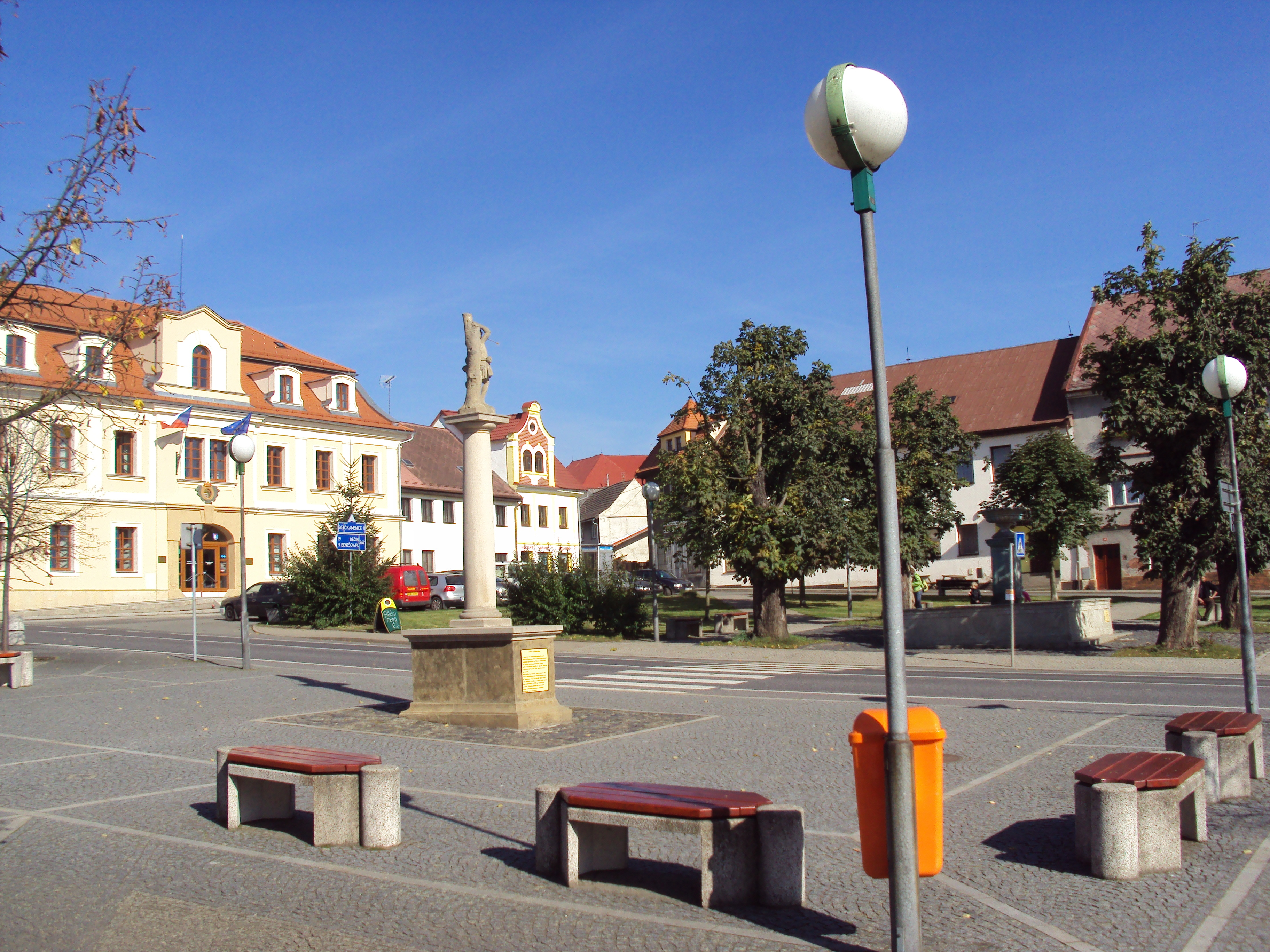 Hlavní náměstí v Žandově